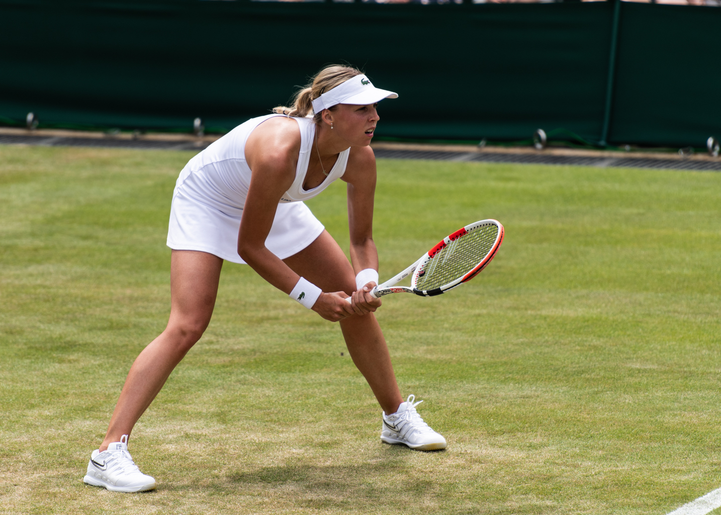 Anett Kontaveit